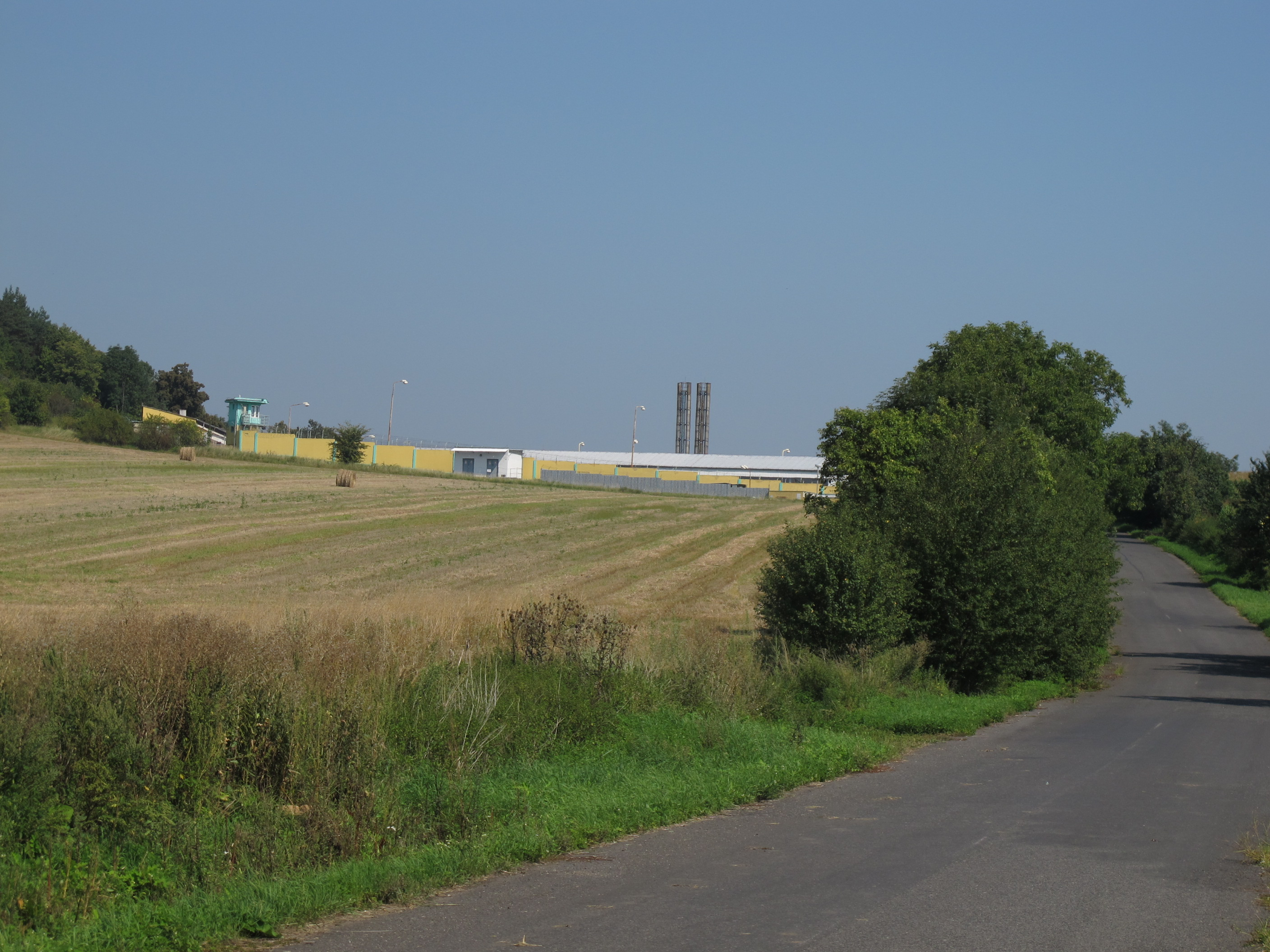 Bělušická věznice, okres Most